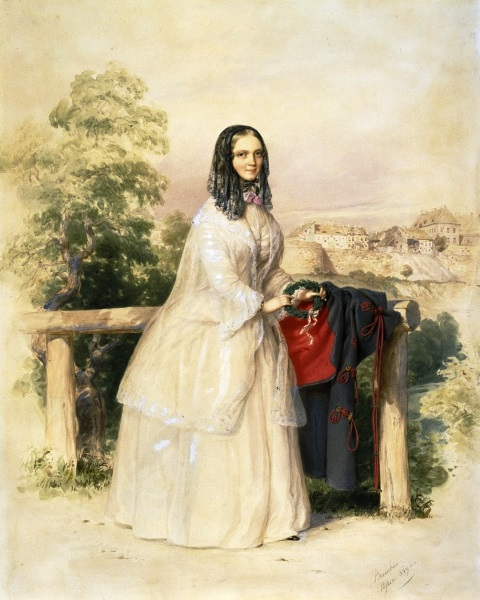 Schmidt Emma, Nagysándor József aradi vértanú menyasszonya